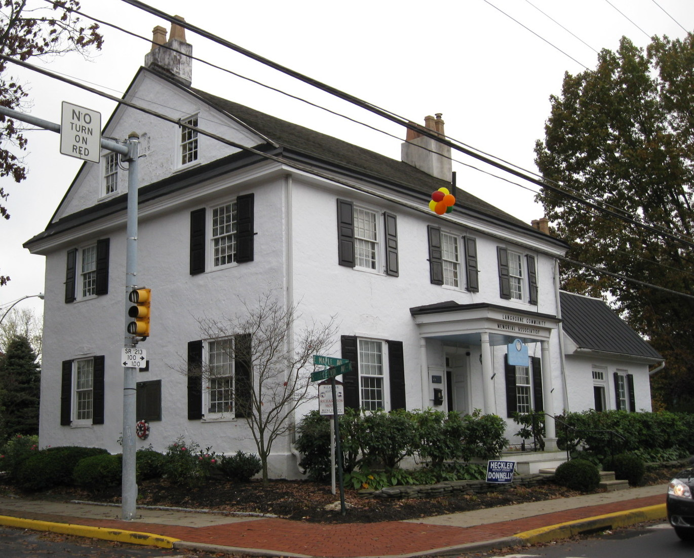 Langhorne, Pennsylvania